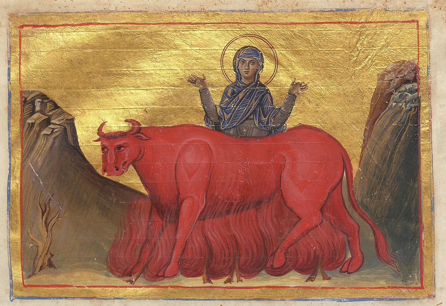 Святая дева Пелагия Константинополь. 985 г. Миниатюра Минология Василия II. Ватиканская библиотека. Рим.